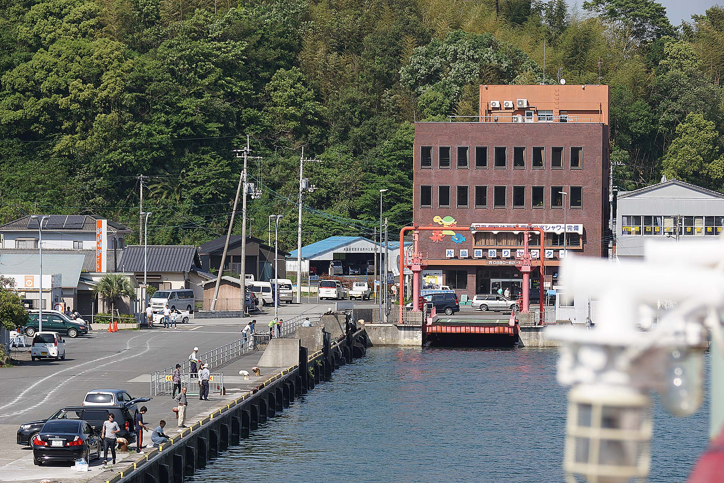 Sukumo Ferry terminal / 宿毛 フェリーターミナル